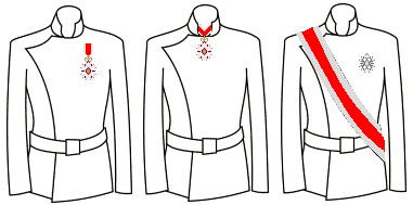 Modo di indossare le decorazioni dell'Ordine di San Giuseppe (Granducato di Toscana)